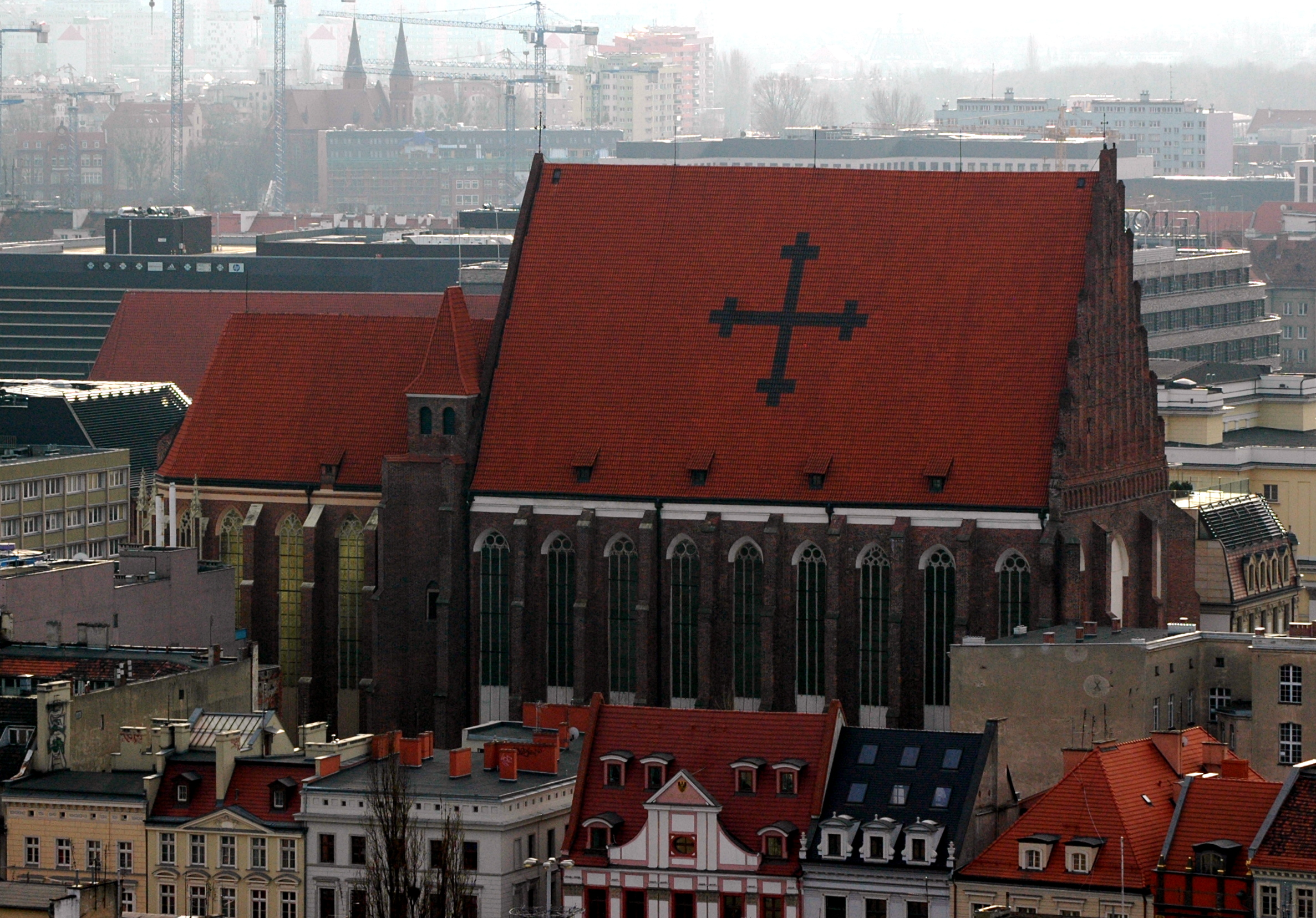 Kościół św. Stanisława, św. Doroty i św. Wacława we Wrocławiu w 2015 roku